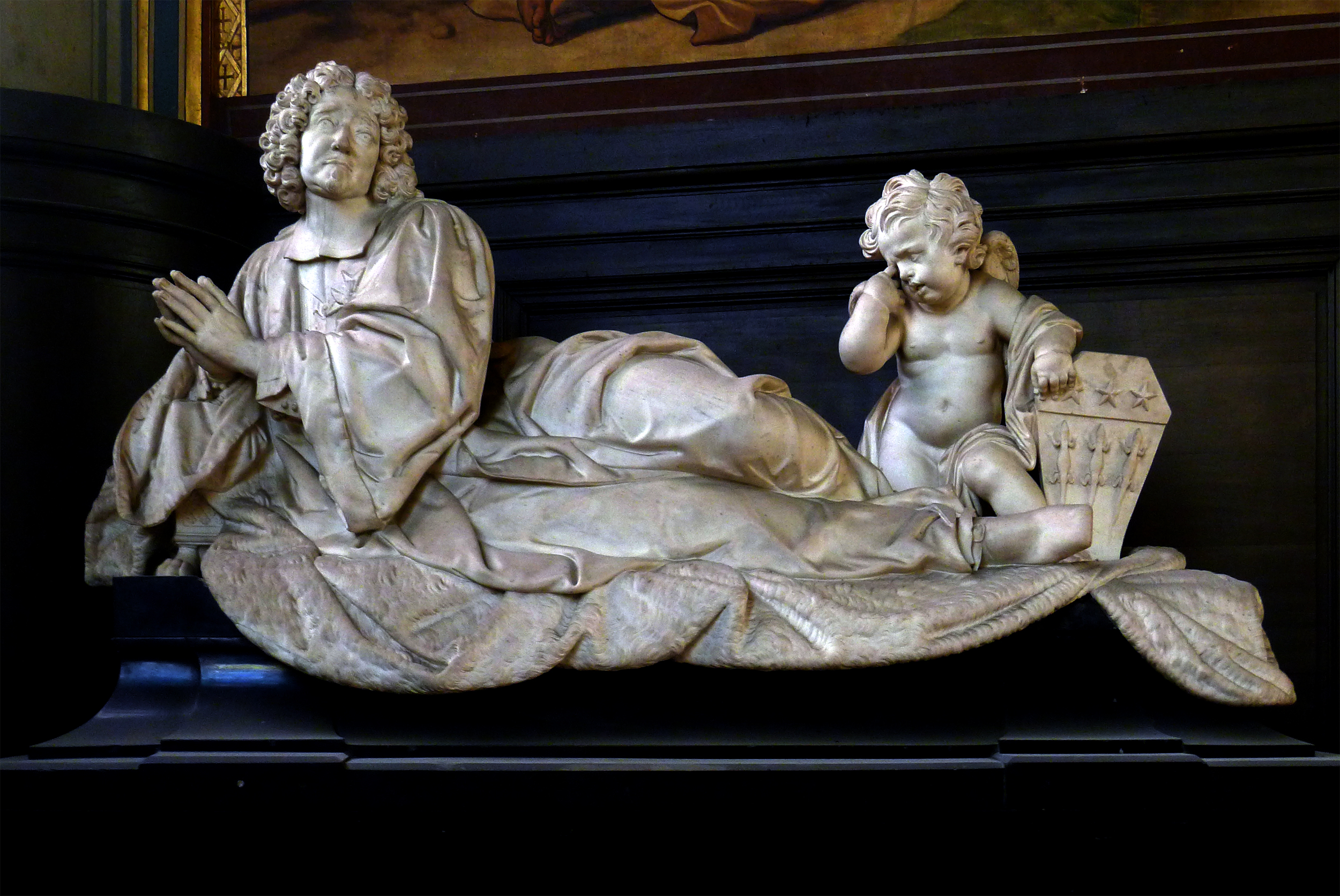 Église Saint-Gervais-Saint-Protais - Paris IV Gisant de Michel Le Tellier (1603-1685), chancelier de France ; armoiries : D'azur, à trois lézards d'argent en pal, posés en fasce, au chef cousu de gueules, chargé de trois étoiles d'or.Oeuvre réalisée en 1686 par Pierre Mazeline et Simon Hurtrelle ; elle se trouve en 2014 dans une chapelle de l'église Saint-Gervais-Saint-Louis de Paris.